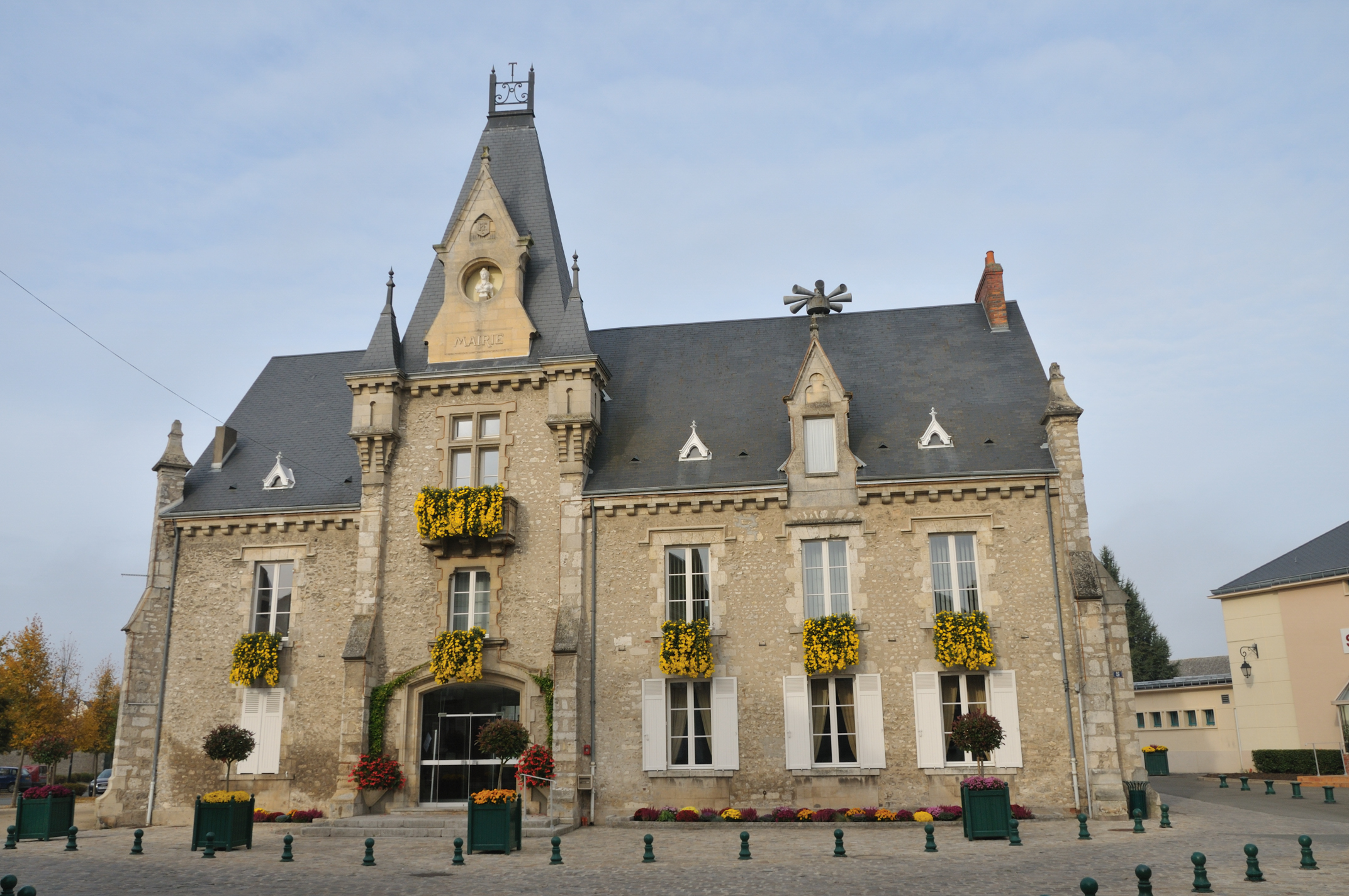 Mairie de Toury, Eure-et-Loir, France